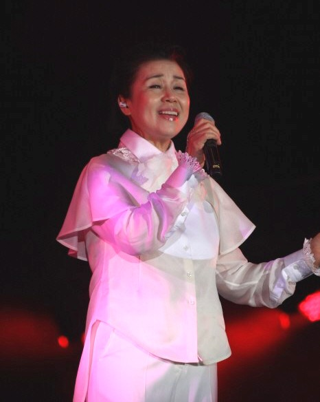 가수 심수봉